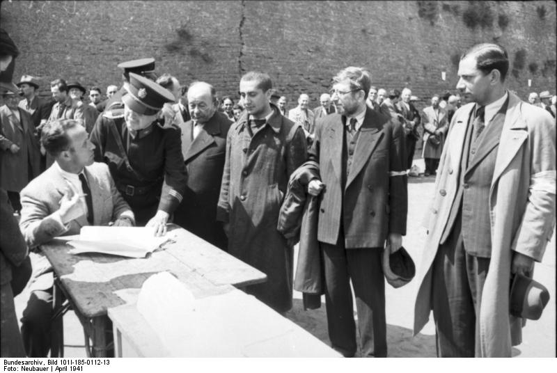 Südost-Front: Juden Belgrads werden zu Aufräumungsarbeiten erfasst.-Hier werden die Juden Belgrads listenmässig erfasst und auf die Arbeitsplätze eingeteilt. PK-Neubauer-Scherl Bilderdienst 4683-41 April 1941 [Bildtext von Bild 183-L26434]